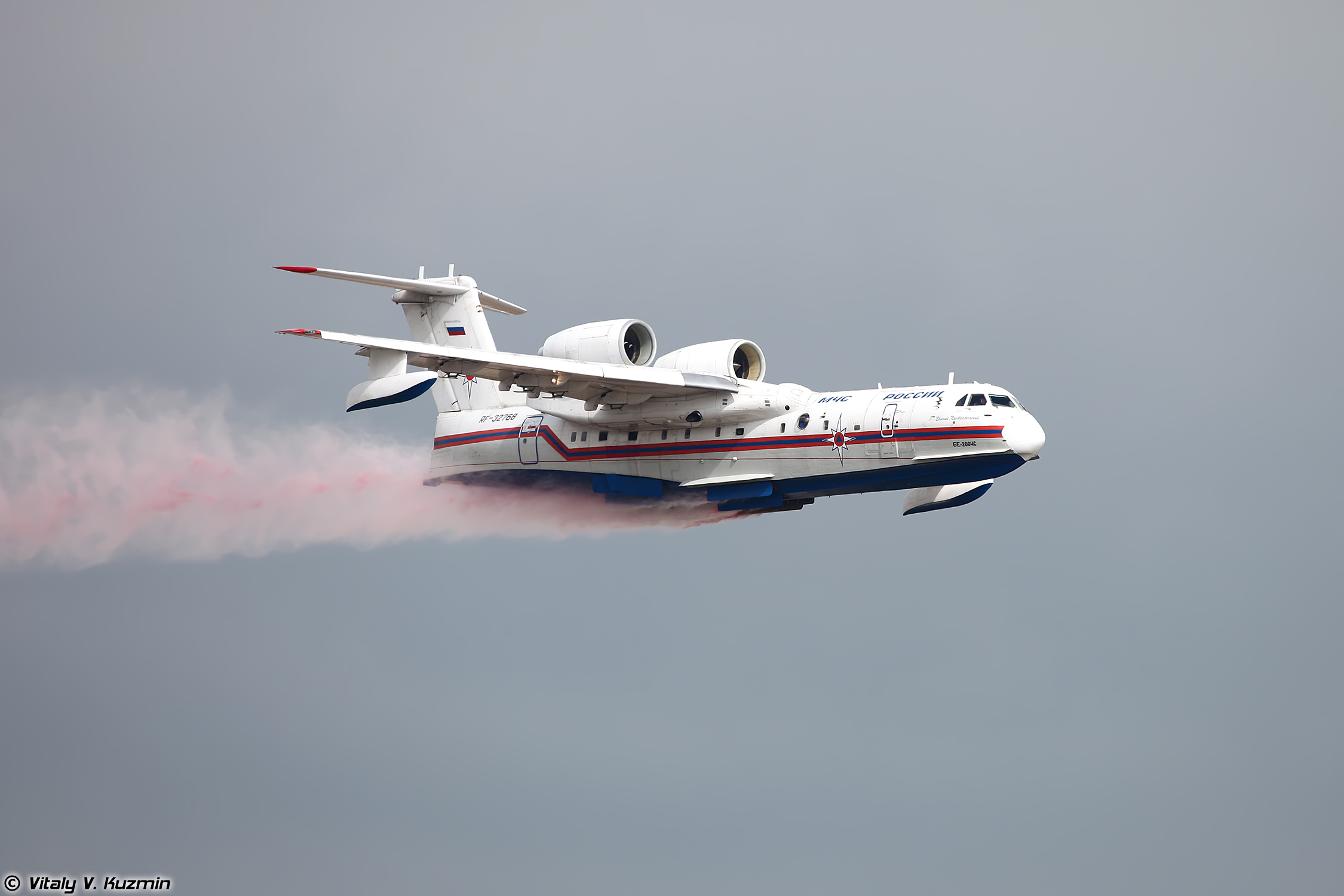 Бе-200ЧС (Be-200ChS)